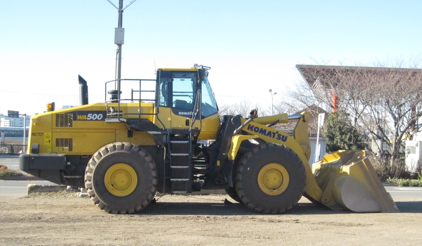 標準仕様の大型ホイールローダー